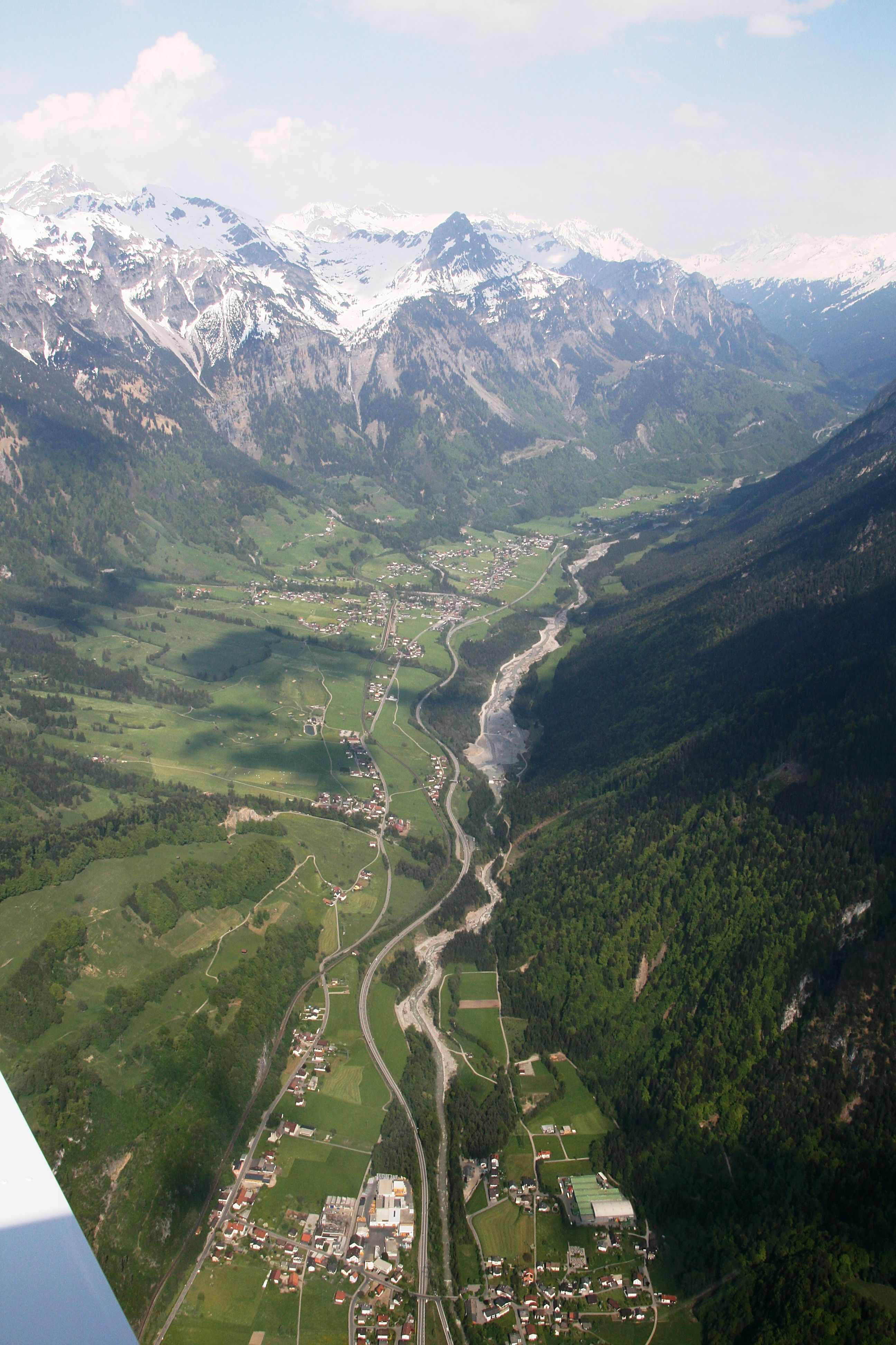 Luftaufnahme von Bludenz, Bings über Innerbraz, entlang der Arlberg Schnellstraße S16 und der Arlbergbahn durch´s Klostertal in Vorarlberg. Aufgenommen während eines Fluges mit einer Propellermaschine des Types: D-EJCR Robin DR400-180R. Flughöhe ca. 1800m. Im Hintergrund das Lechquellengebirge.